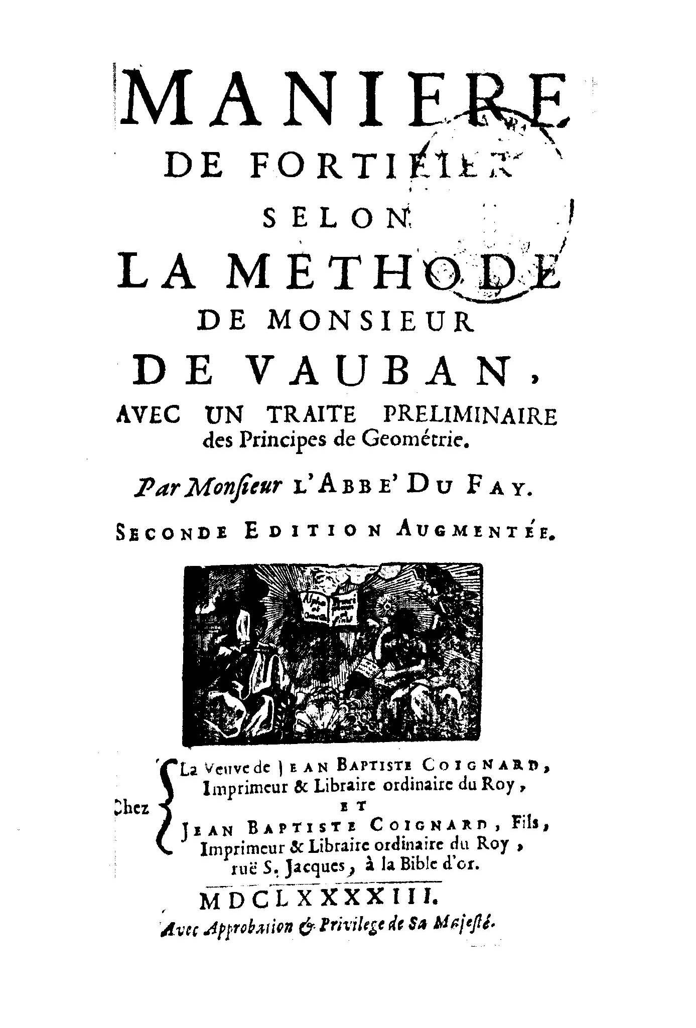 Manière de fortifier selon la méthode de Monsieur De Vauban, avec un traité preliminaire de geométrie. Par monsieur l'Abbé Du Fay. - [Paris] : chez la veuve de Jean Baptiste Coignard, imprimeur & libraire ordinaire du roy ; chez Jean Baptiste Coignard, fils, imprimeur & libraire ordinaire du Roy, ruë s. Jacques, à la Bible d'or, 1693. - [8], 198, [14] p., [1] c. di tav. : ill. ; 12º .